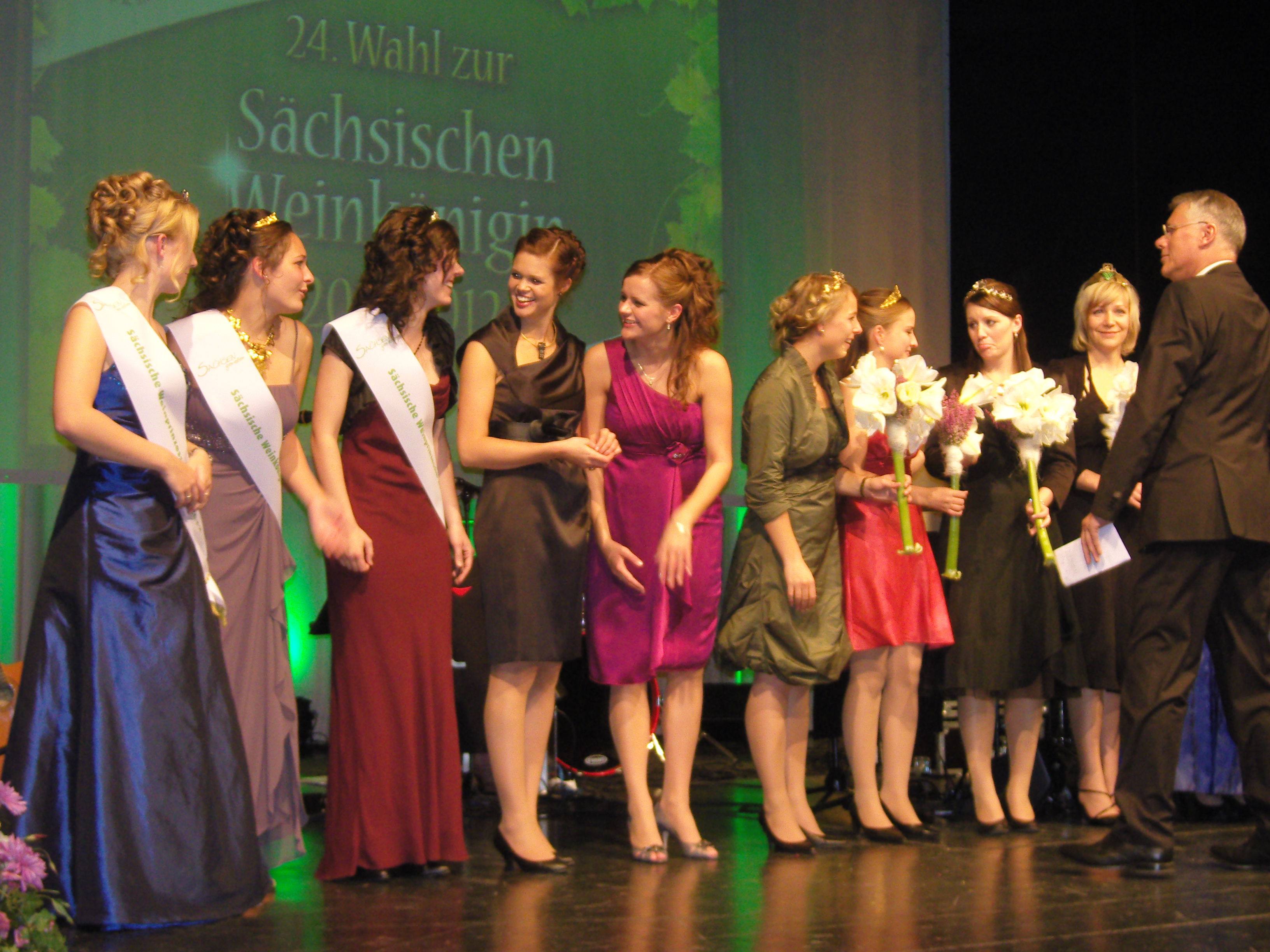 Wahl zur Sächsischen Weinkönigin 2011/2012; links die Sächsischen Weinmajestäten 2011/2012; dann Mandy Großgarten (Moderatorin des Abends und deutsche Weinkönigin 2010/2011, die Sächsische Weinkönigin 2010/2011 Juliane Kremtz sowie weitere Weinhoheiten aus befreundeten Weinanbaugebieten